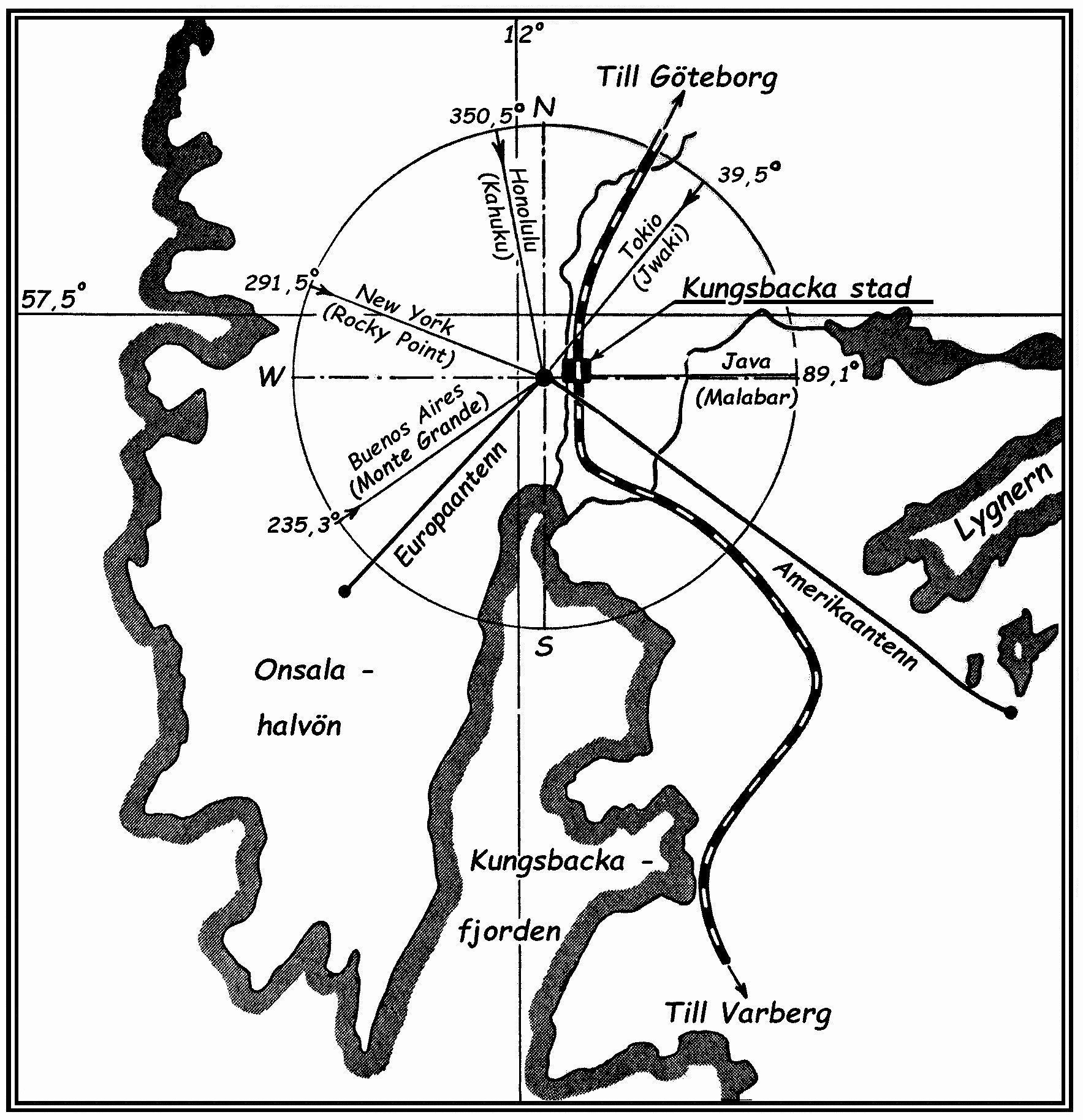 Karta över Kungsbacka Radios två Beverage-antenner, den 13,4 km långa Amerikaantennen, och den 7 km länga Europaantennen, och riktning till några samtida radiostationer.